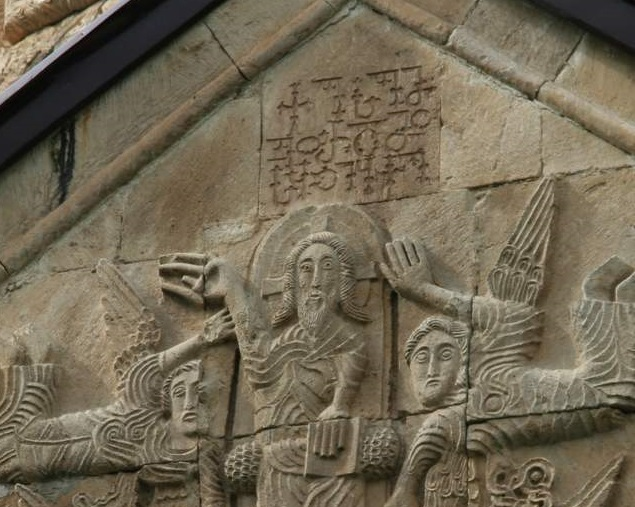 ნიკორწმინდის კიდურყვავილოვანი წარწერა